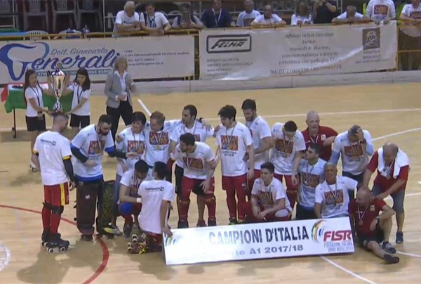 Giocatori, tecnici e dirigenti dell'Amatori Wasken Lodi festeggiano al PalaCastellotti la conquista del campionato italiano 2017-2018 di hockey su pista